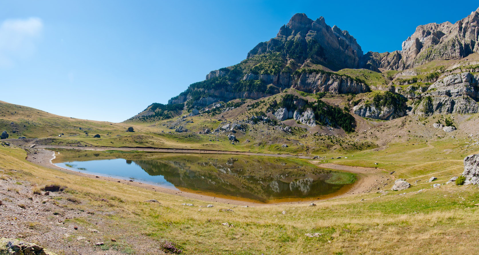 Ibón de Piedrafita, Pirineo Aragonés.